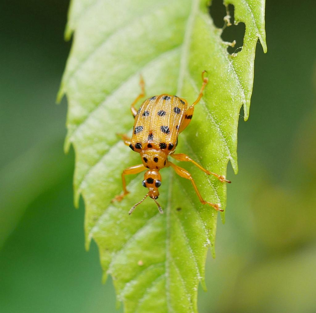 2019/06/16 和歌山県田辺市：Tanabe City. Wakayama Pref. Japan